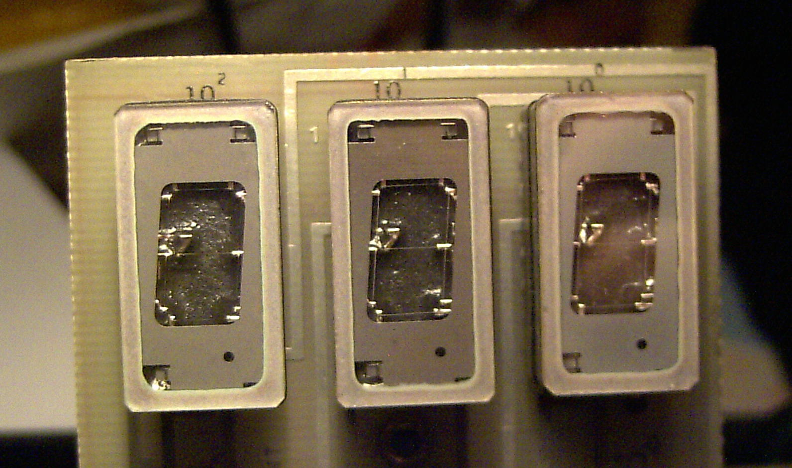 Display de incandescencia